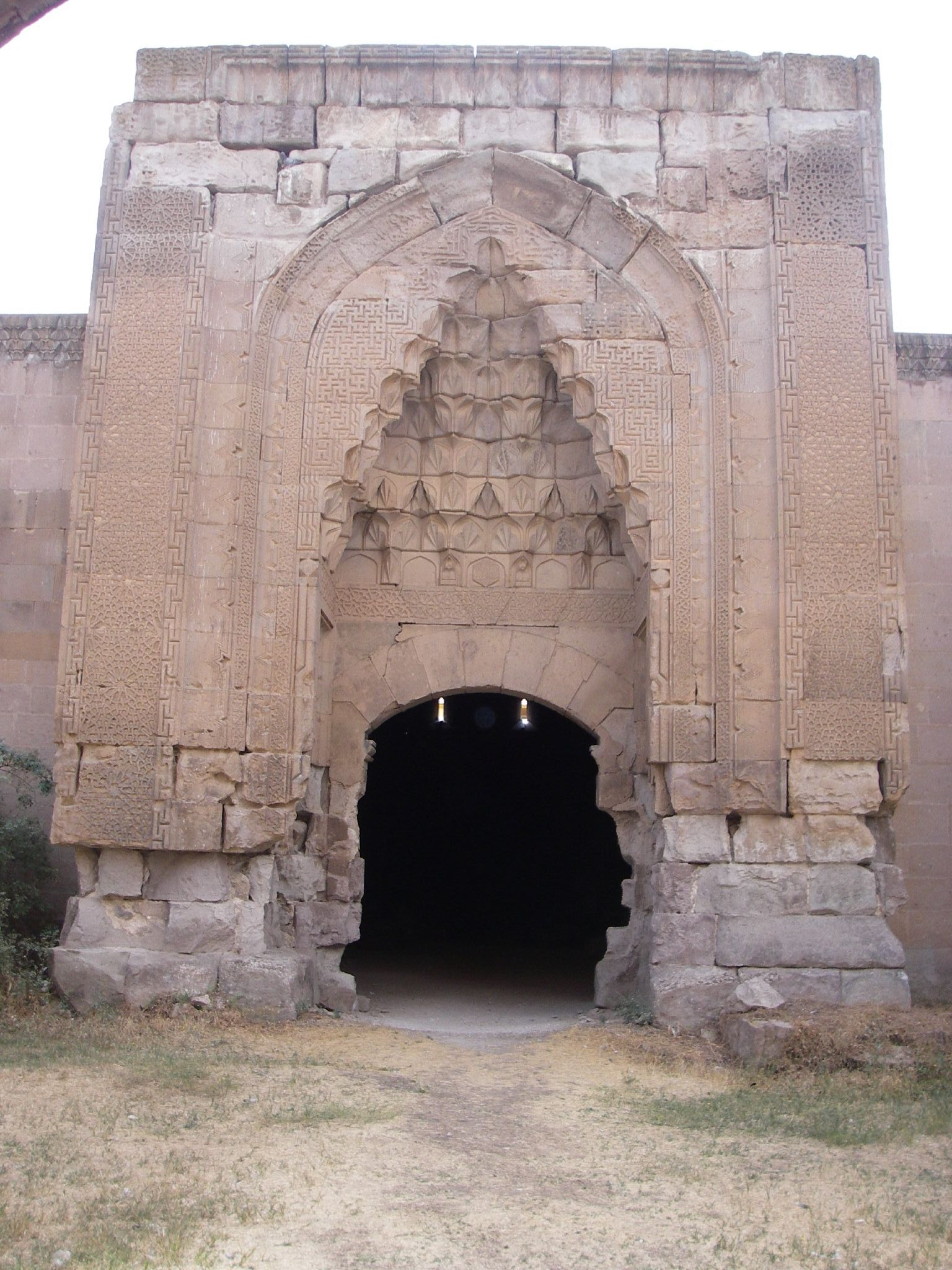 Sultanhanı